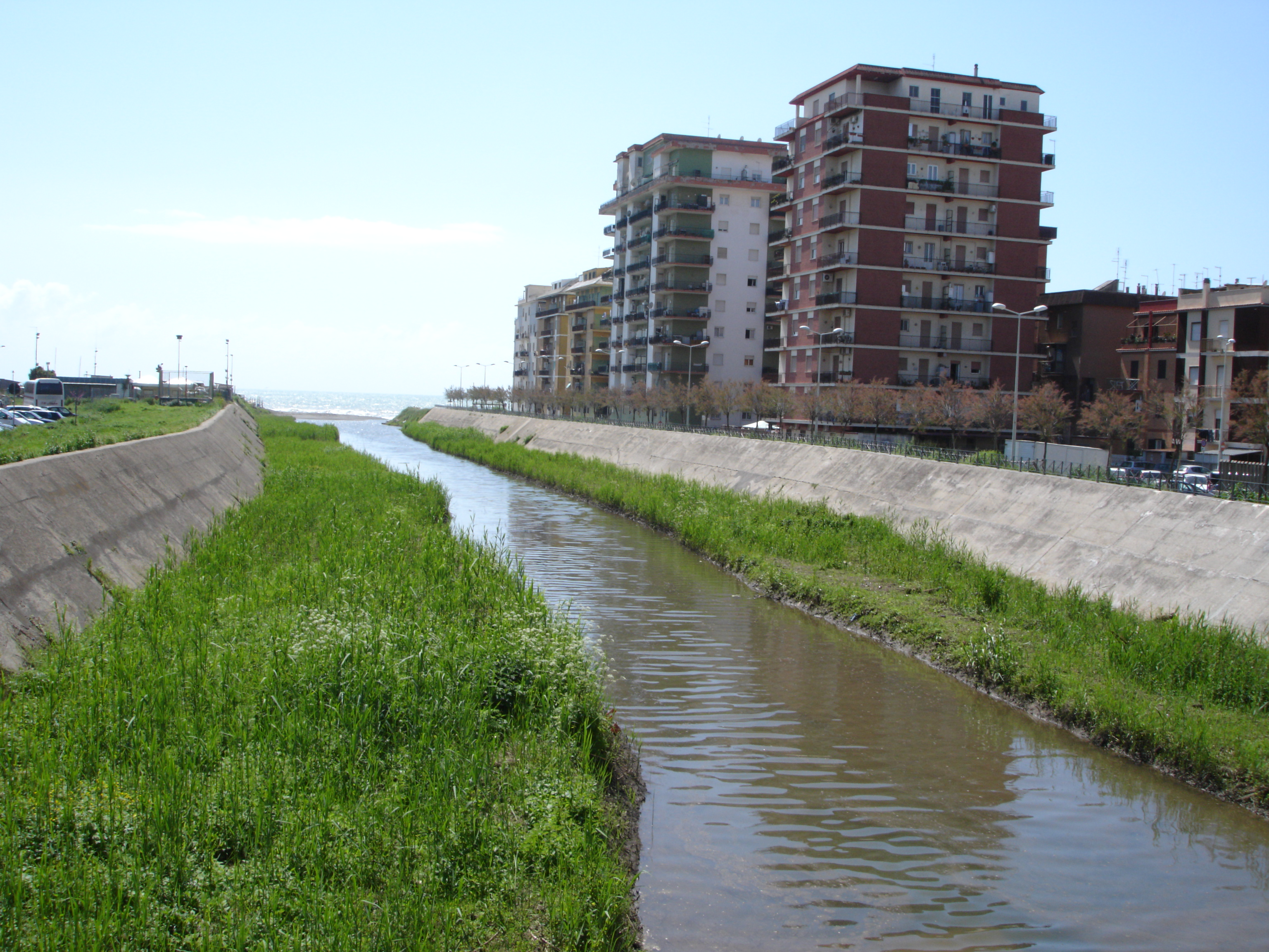 Foto del fosso della vaccina a Ladispoli, fatta da sopra il ponte